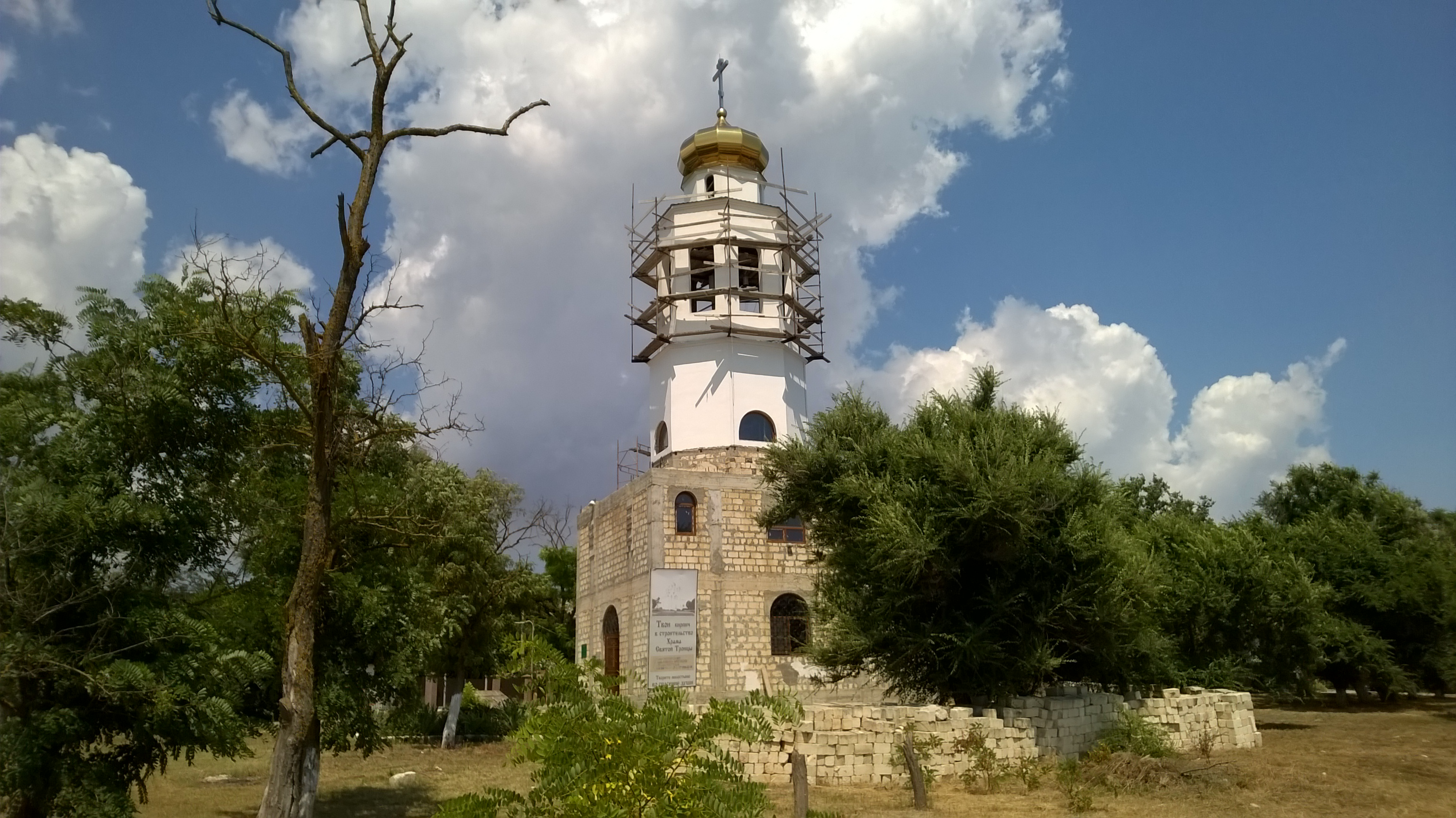 Троицкая церковь в селе Береговое (Феодосия).